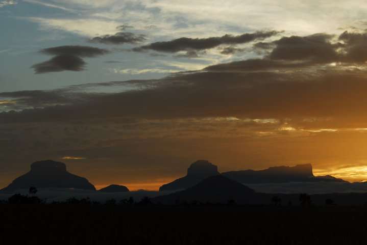 atardecer en kavanayen